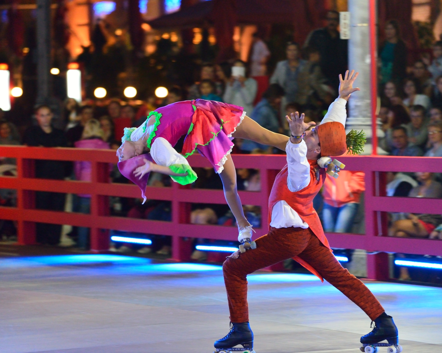 Танцы на роликовых коньках